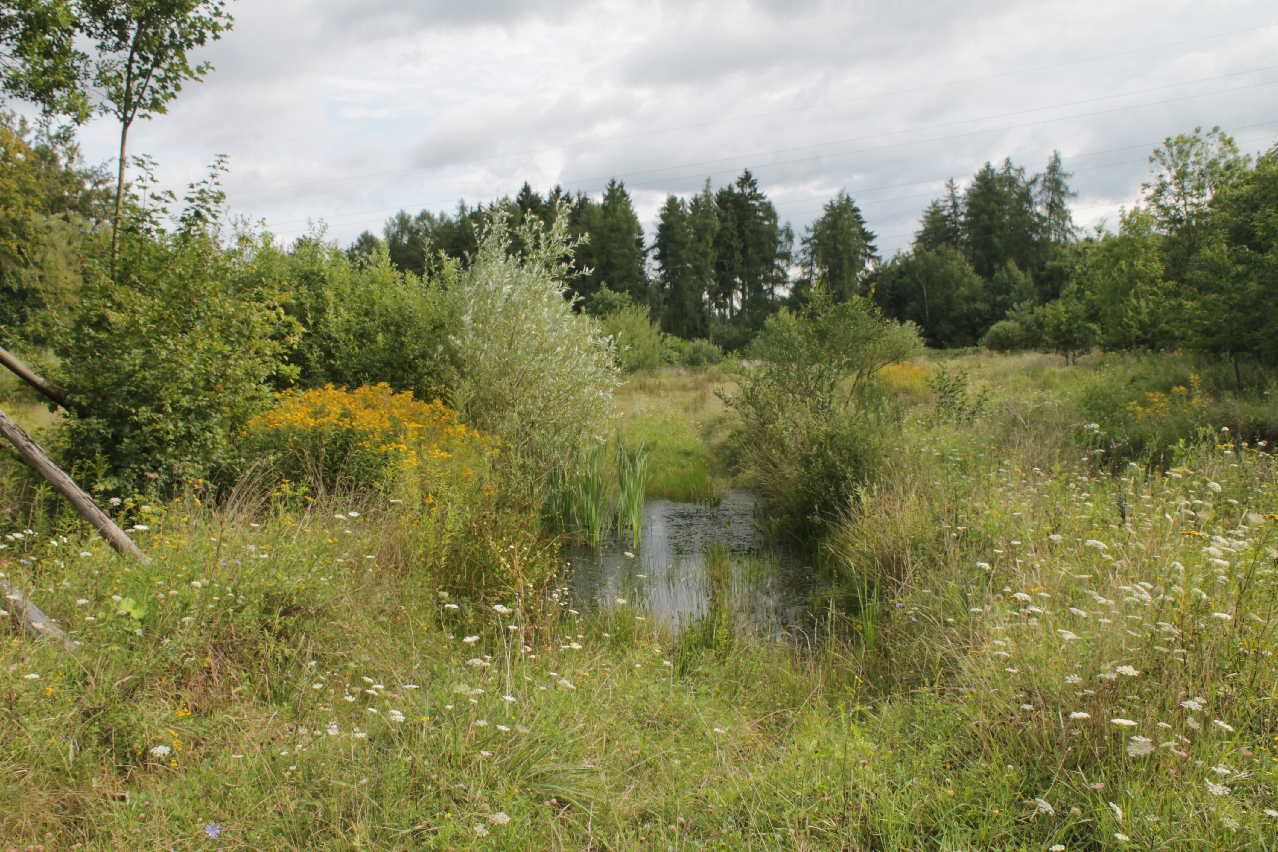 Ein Ausflug zur Schmidtenhöhe ist jedesmal ein Abenteuer für Naturfreunde, es gibt immer etwas zu entdecken.